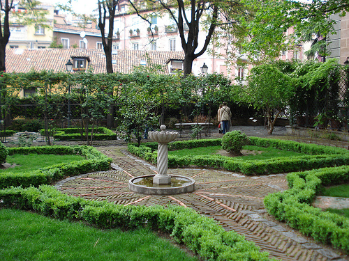 Príncipe de Anglona Garden. Madrid, Spain